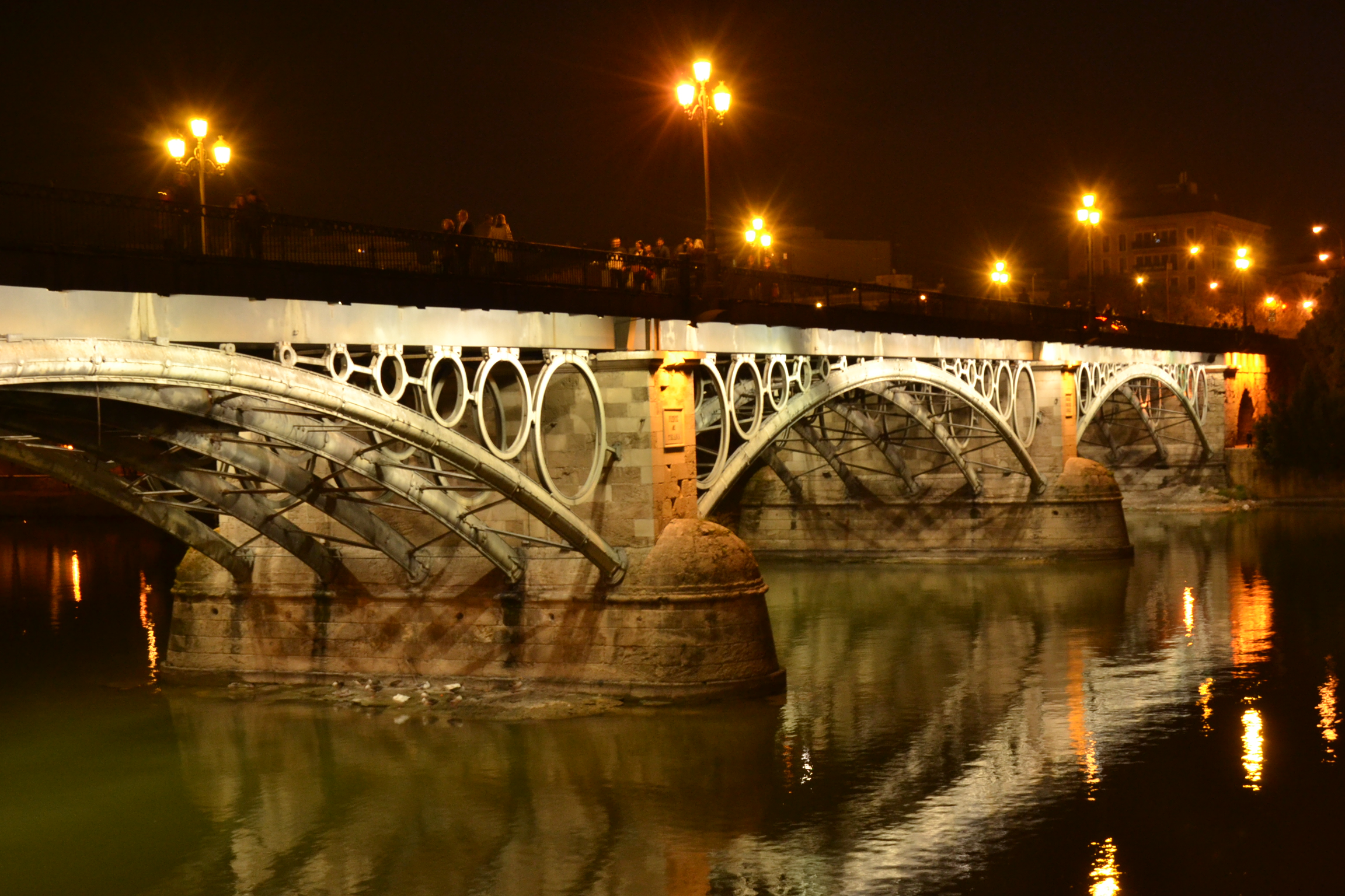 Puente de Triana, marzo de 2012